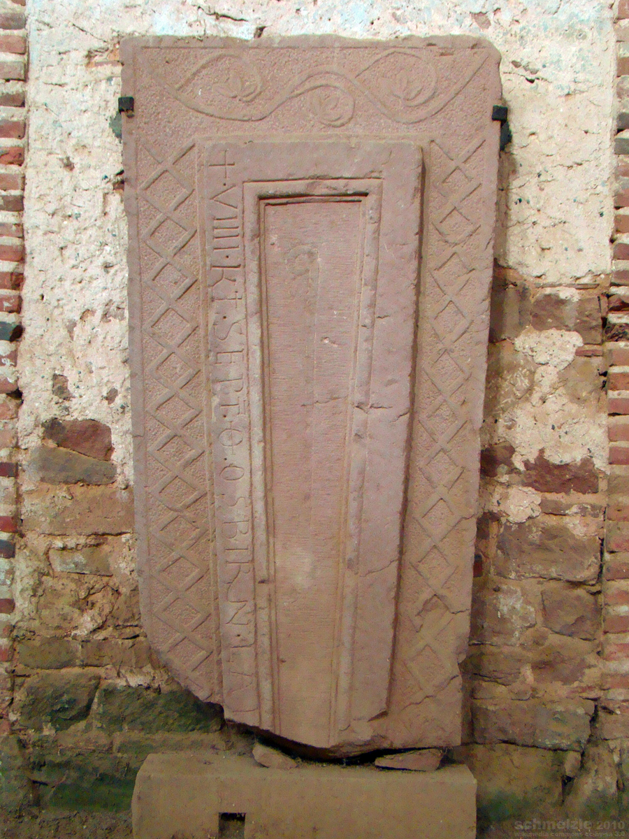 Grabplatte in der Einhardsbasilika in Steinbach